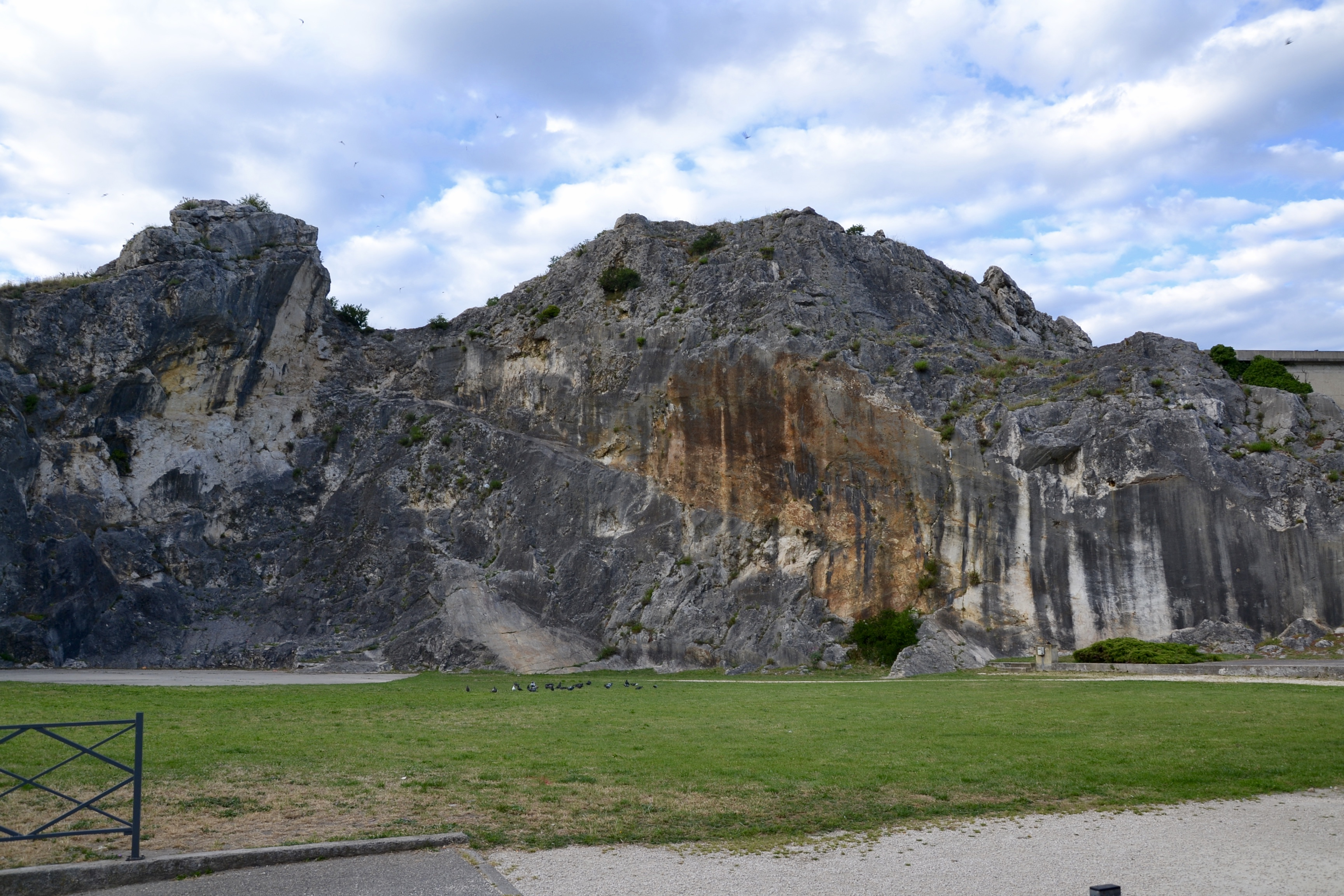 Le rocher de Pierrelatte (Drôme, France).